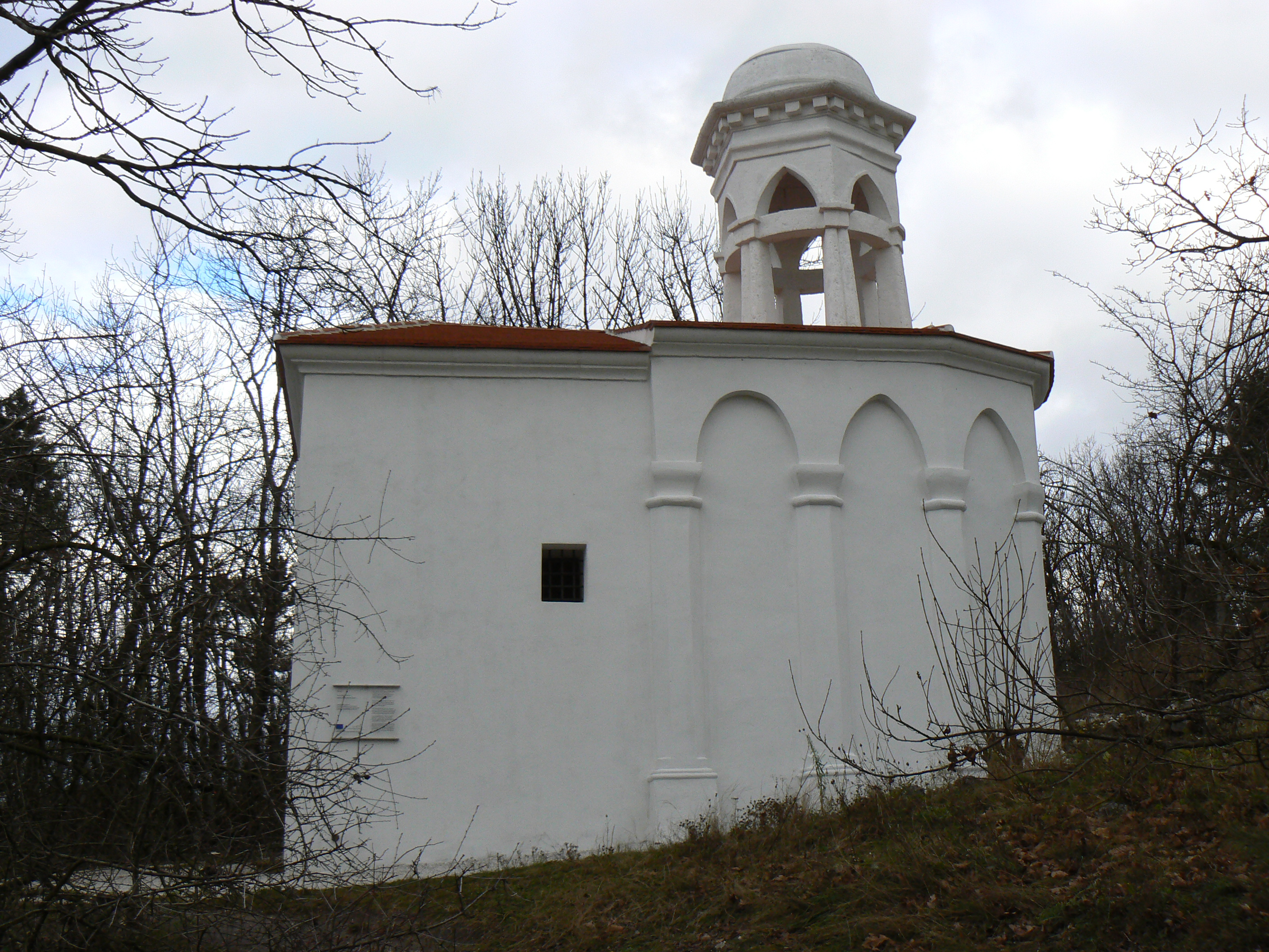 Křížová cesta a kaple Božího hrobu (Mikulov), na Kopečku, Mikulov